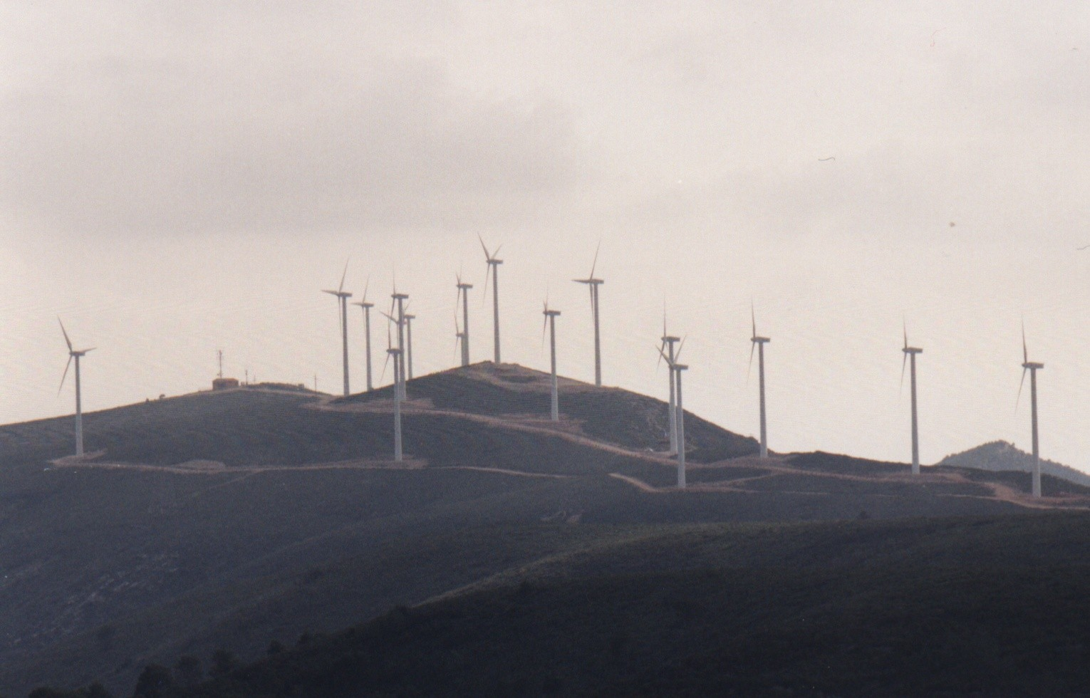 Imagen de este cerro